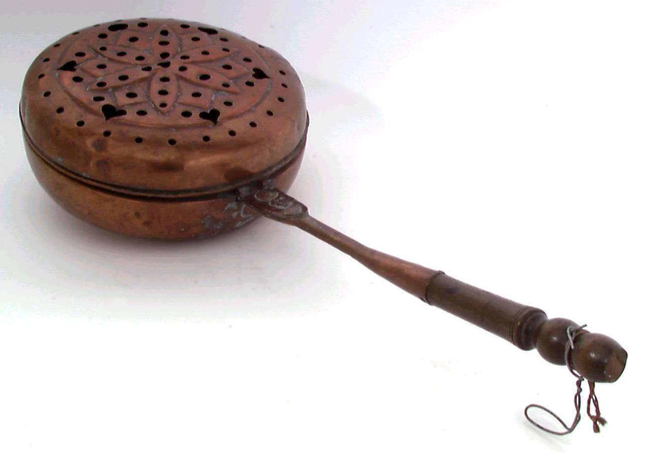 Varmebekken brukt som sengevarmer. Datert til 1910